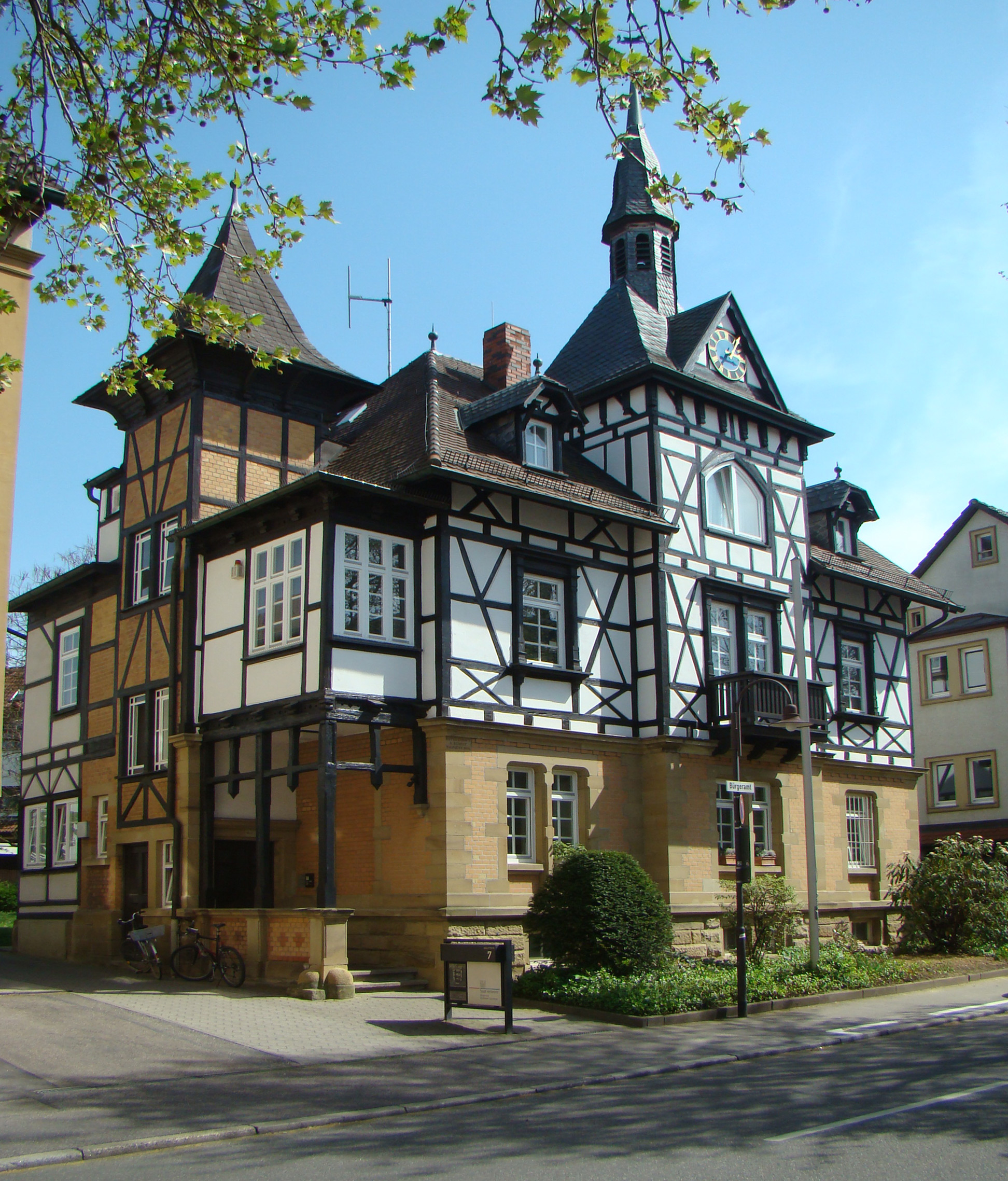 Altes Rathaus in Heilbronn-Sontheim